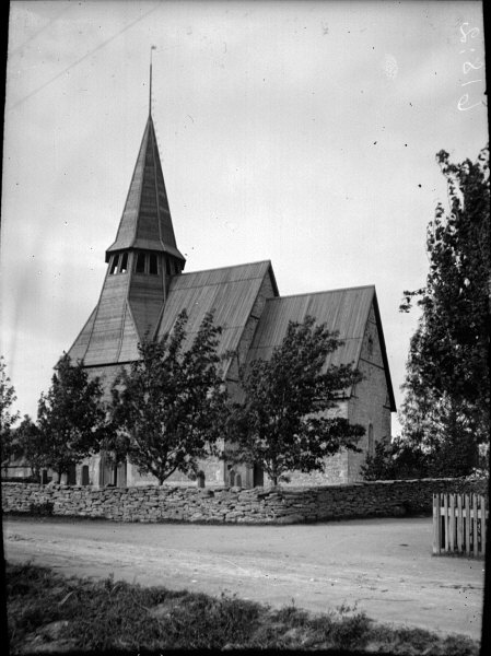 Kyrkan från söder.